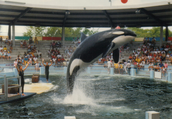 Picture of my own, Piotr Domaradzki, Miami, FL, 1998